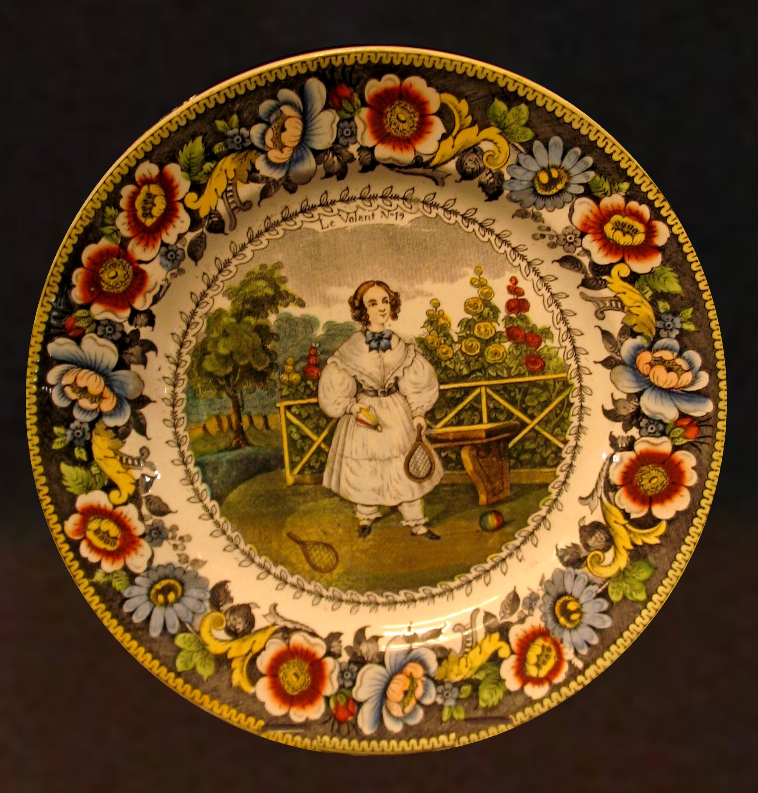 Assiette plate en faïence à décor imprimé et peint, Creil, 1827-1840. Musée Gallet-Juillet. Creil, France.